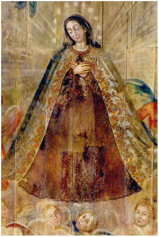 Teto da Capela da Ordem Terceira do Carmo de São Paulo, detalhe do medalhão central.